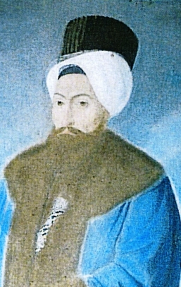 Küçük Hüseyin Paşa ya da Tayazade Damat Küçük Hüseyin Paşa (1757-7 Aralık 1803) Gürcü asıllı Osmanlı devlet adamı ve Kaptan-ı Derya'ydı.